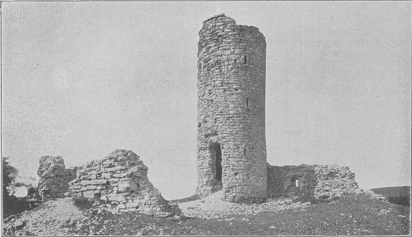 Pamelsche Warte in Paderborn-Dahl (1945 gesprengt)